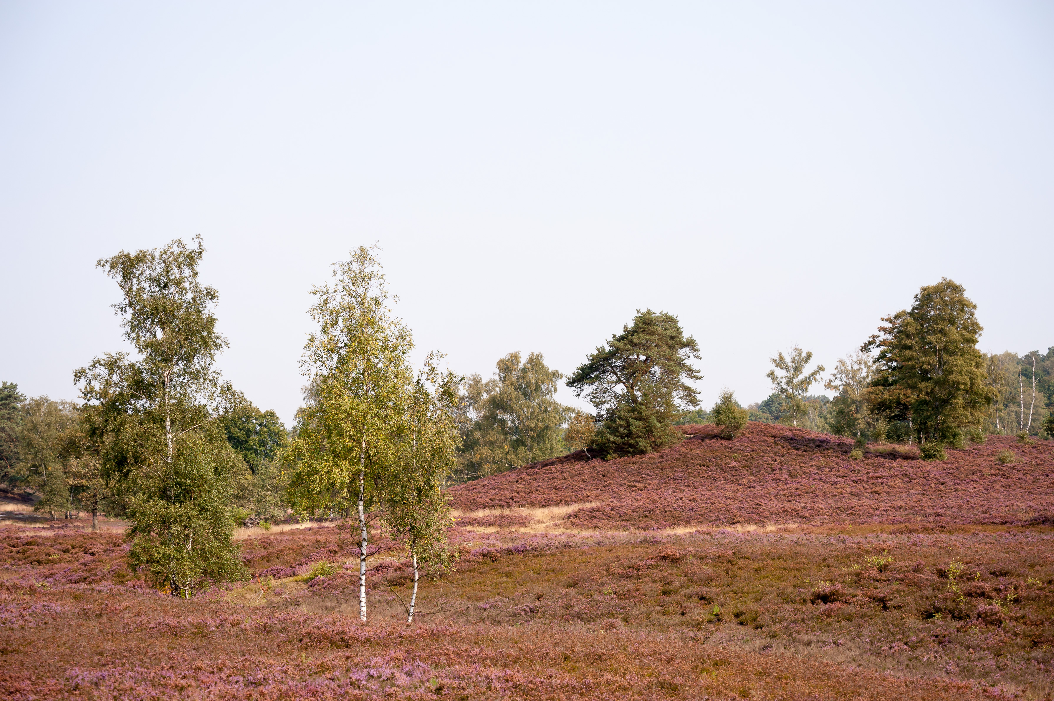 NSG Fischbeker Heide. Heide blüht im Trockental.